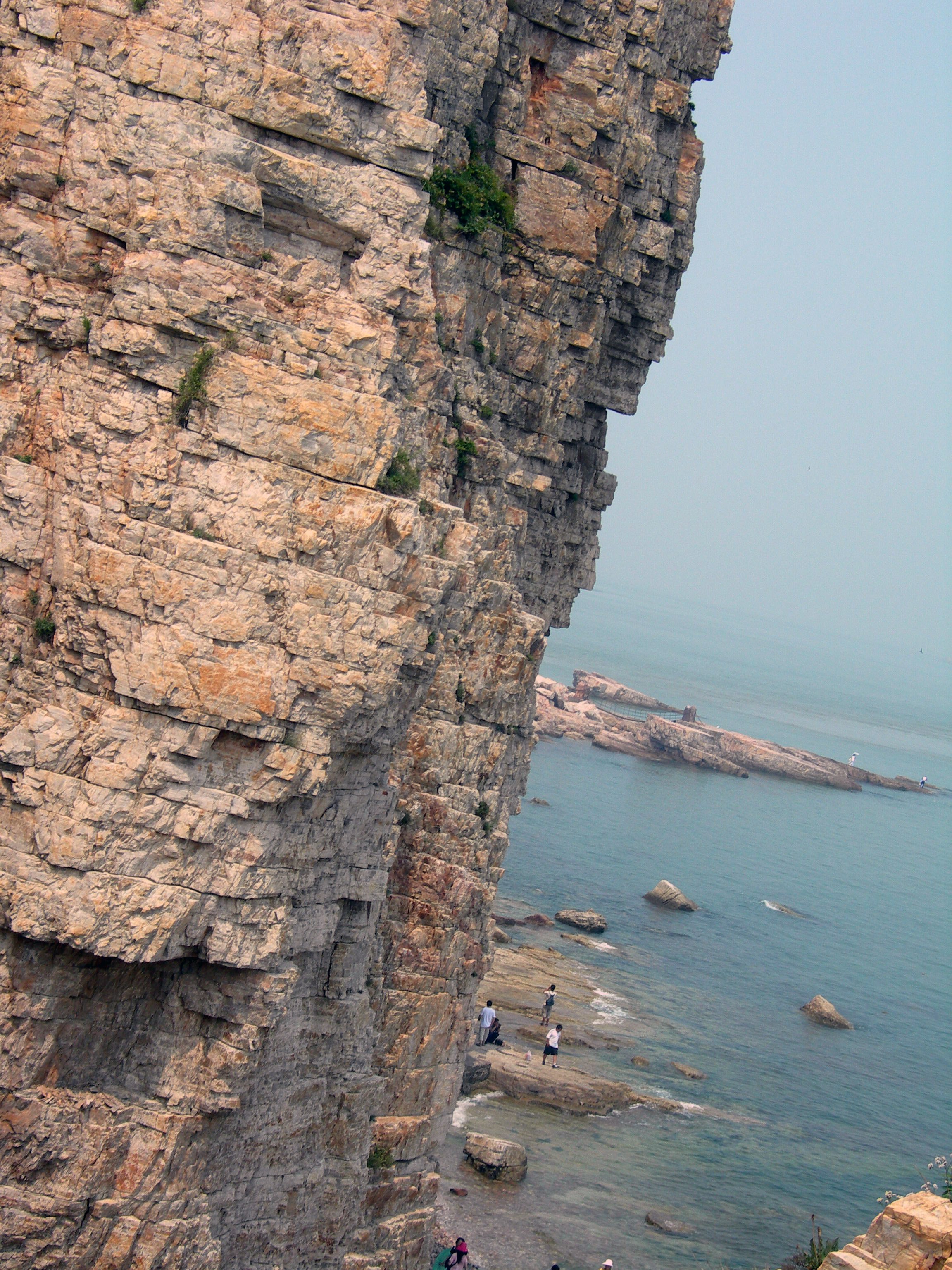 烟台长岛-九丈崖